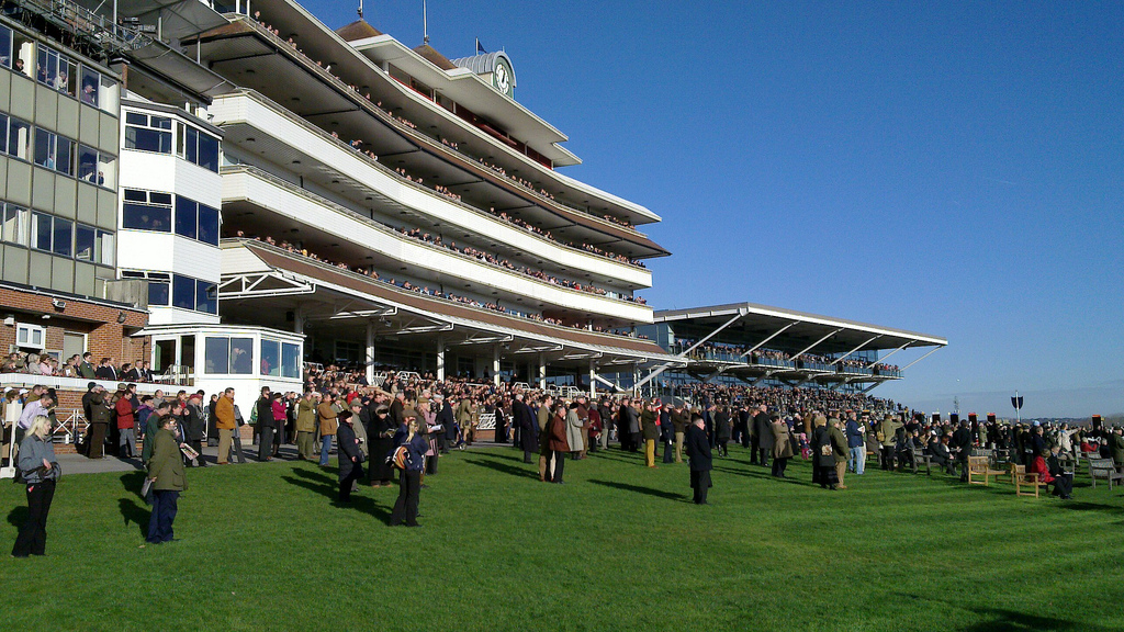 Hennessy meeting November 2010